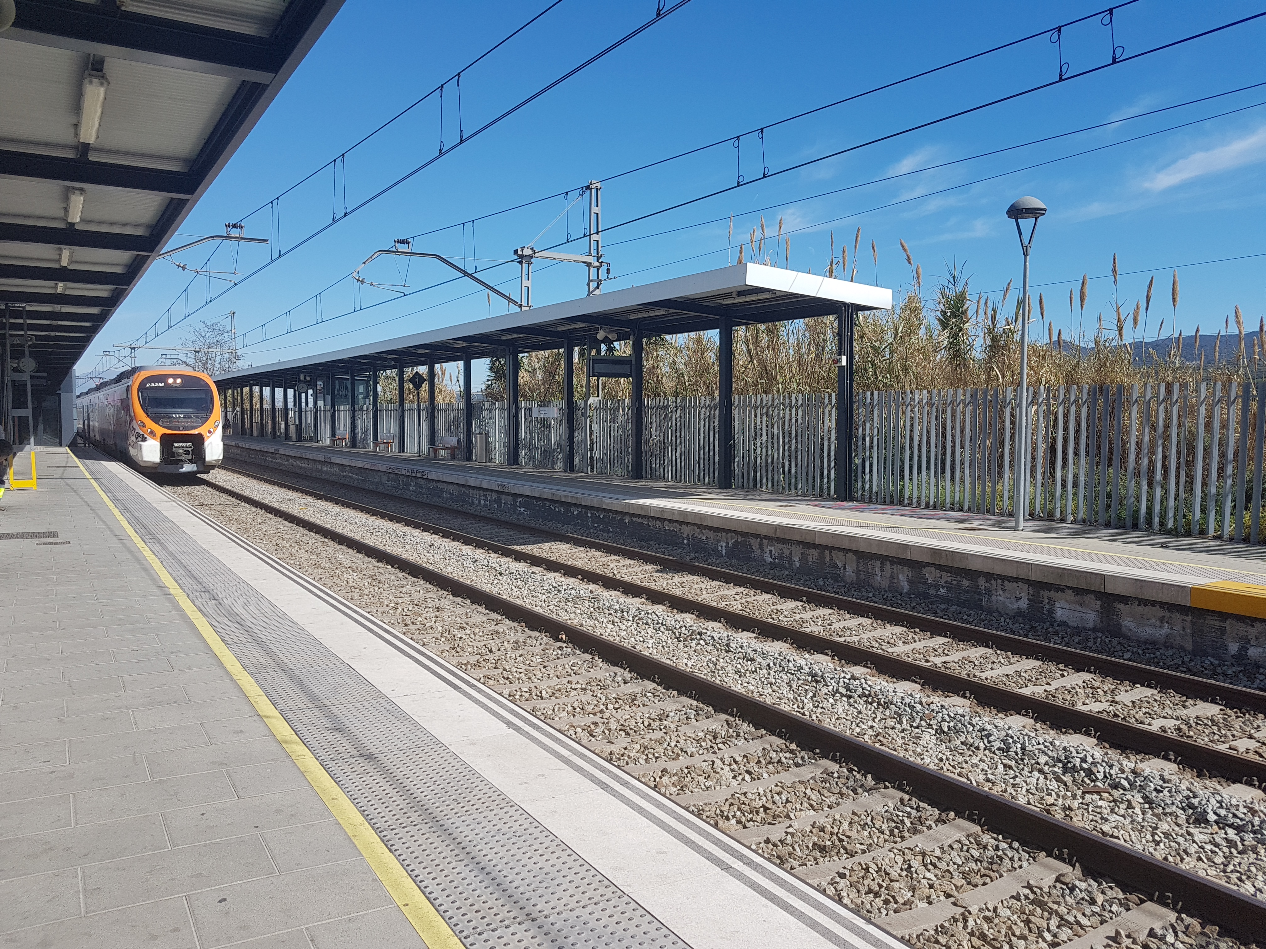 Unitat Civia amb servei R2 Aeroport entra a l'estació de la Llagosta de la línia Barcelona-Granollers-Maçanet Massanes